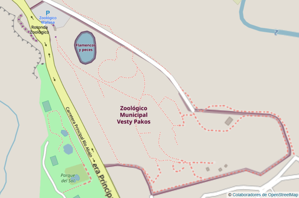 captura de imagen del Mapa del Zoológico Vesty Pakos en OpenStreetMap durante marzo de 2019